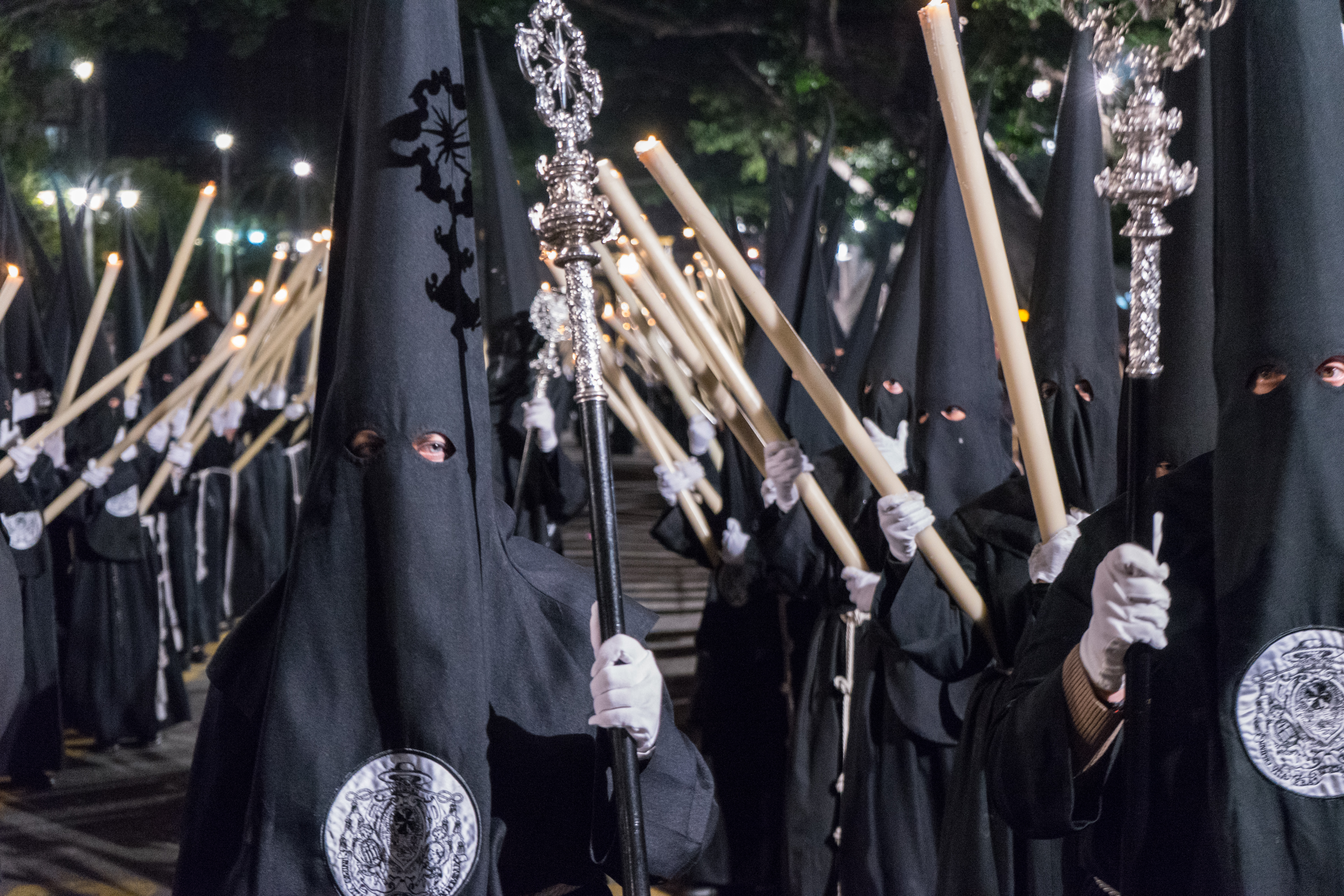 Mayordomo de la Antigua Cofradía del Stmo. Cristo del Perdón y Ntra. Sra. de los Dolores This is a photography of a Folklore festival in Spain (Wikidata id Q9075883).